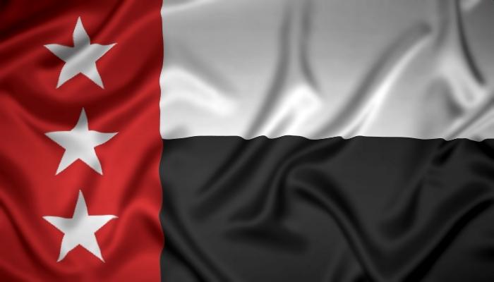 Bandera de la República del Río Grande con proporciones oficiales y acabado Satin Seda, realizada en The Gimp 2.2 y Photoimpression 4